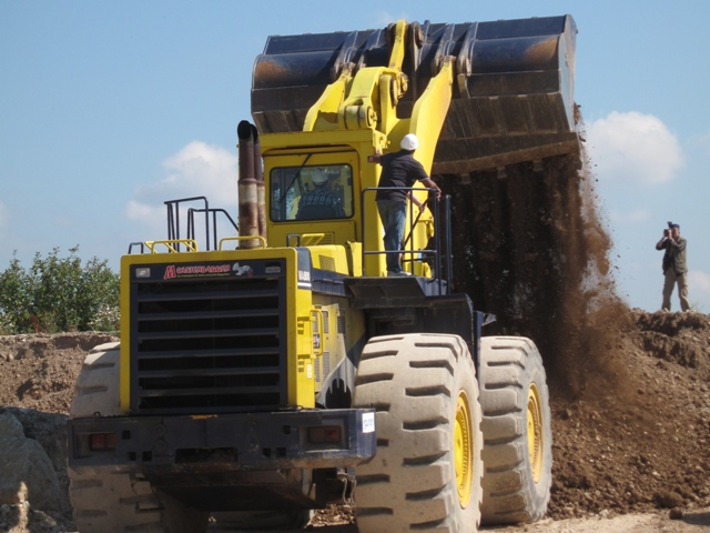 Dieses Bild des Monsterladers Michigan 475 D wurde im Jahr 2012 im Monsterpark Rattelsdorf aufgenommen.